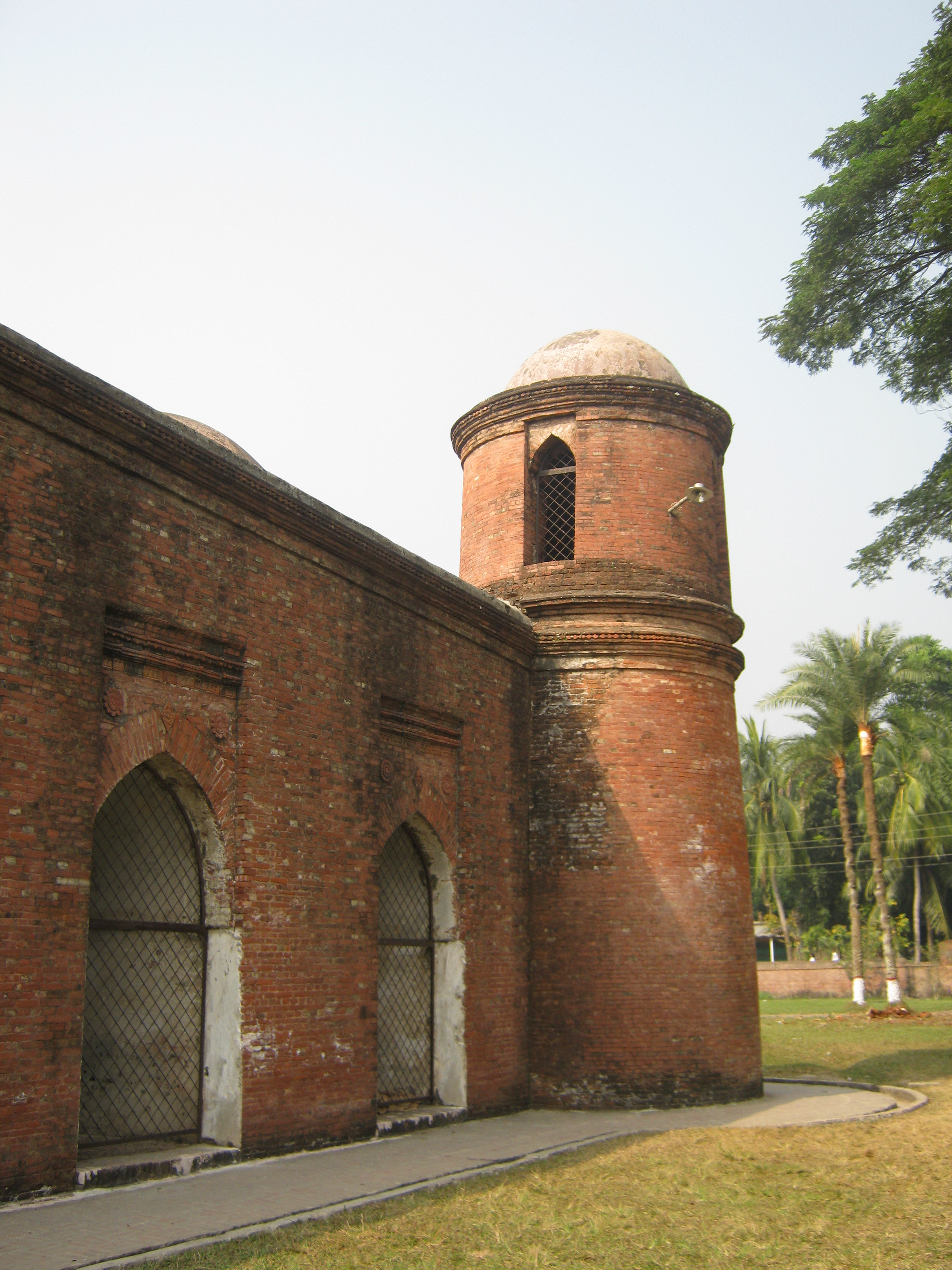 ষাট গম্বুজ মসজিদ